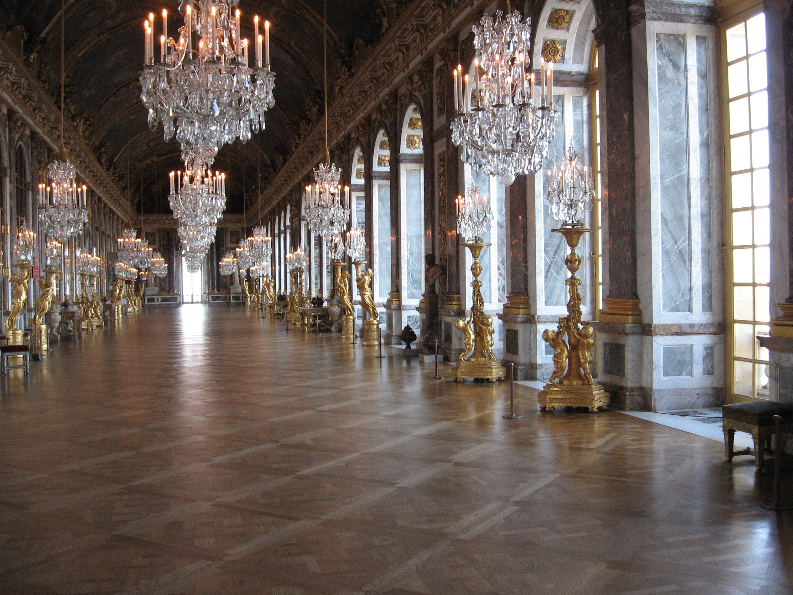 Versailles Galerie des glaces .